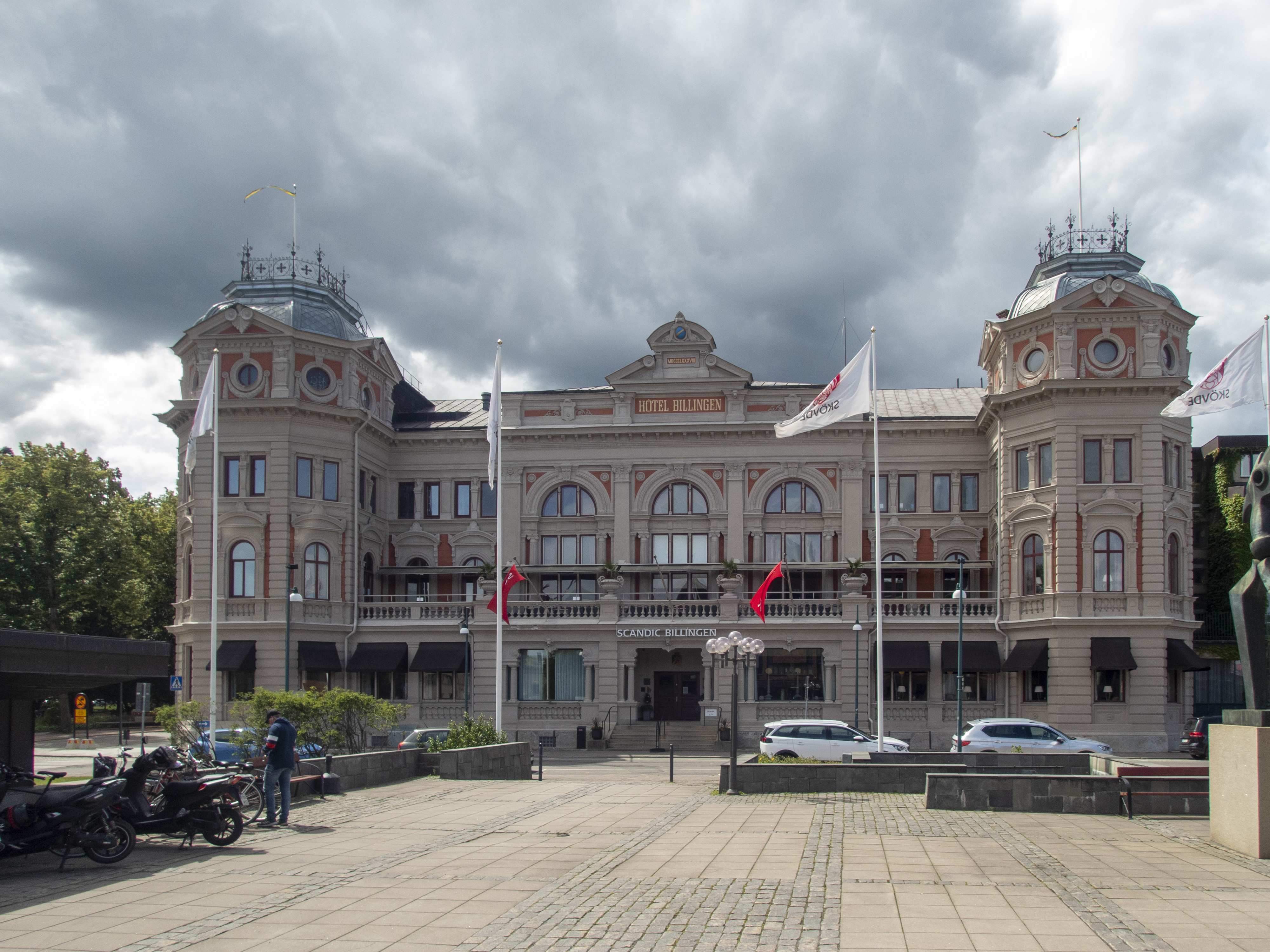 Hotell Billingen. Byggnadsår 1887 - 1888.